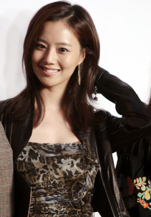 2012년 9월 5일 착한남자 제작 발표회에서.